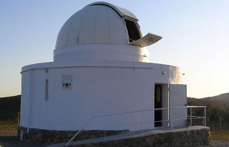 Vista del Observatorio